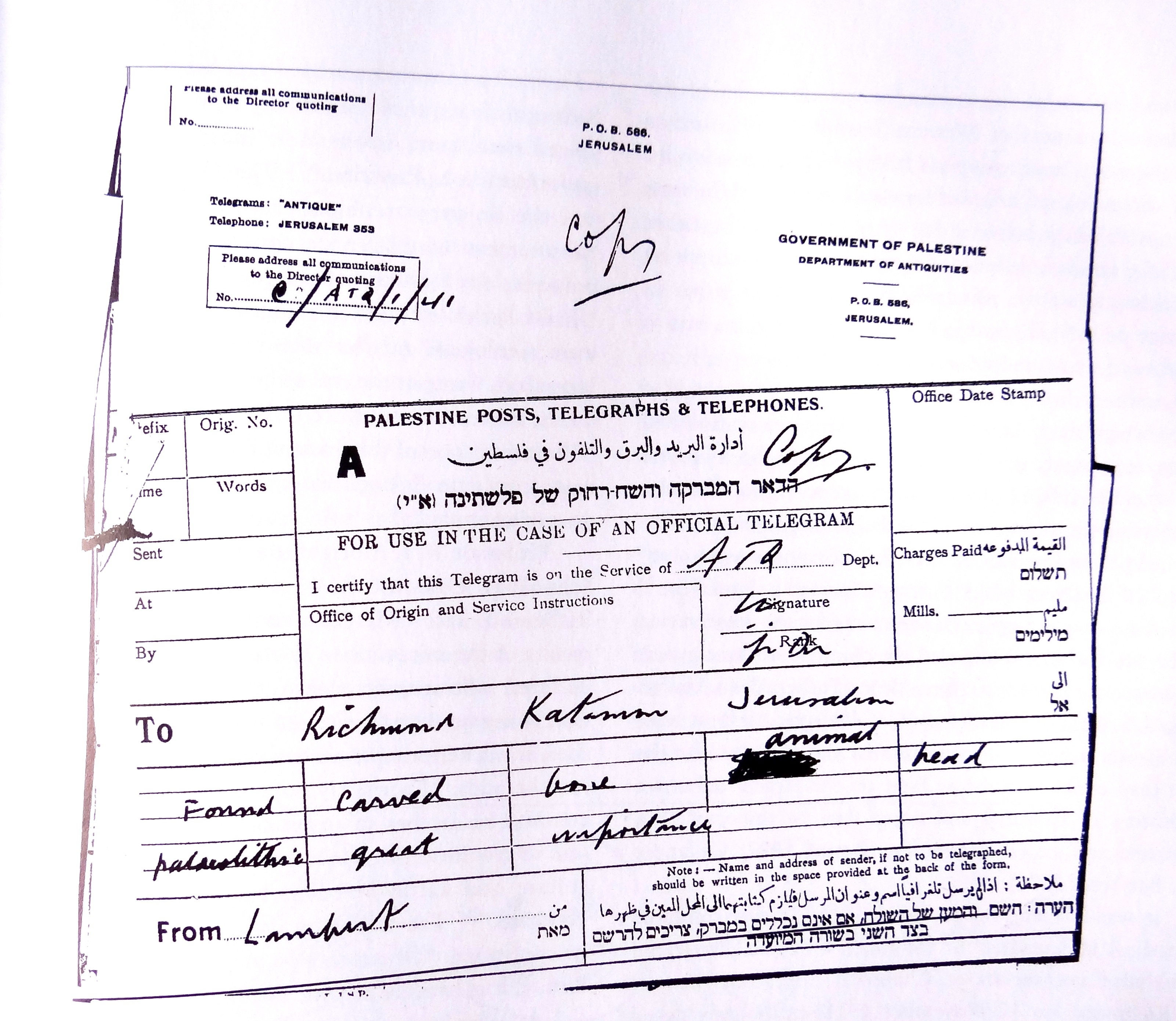 מברקו של צ'ארלס למברט המודיע שהוא מצא חפץ אמנותי הפרהיסטורי בכניסה למערת הנחל, בנחל המערות. בעקבות מברק זה, נשלחה דורותי גארוד לחפור באתר, והתוכנית של ממשלת המנדט הבריטי להפוך את מצוק נחל המערות למחצבה, נגנזה